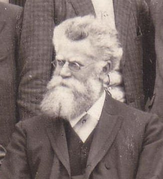 Julius Brzoska, Direktor des Wimpfeling-Gymnasium (heute Lycée Docteur-Koeberlé), 1912